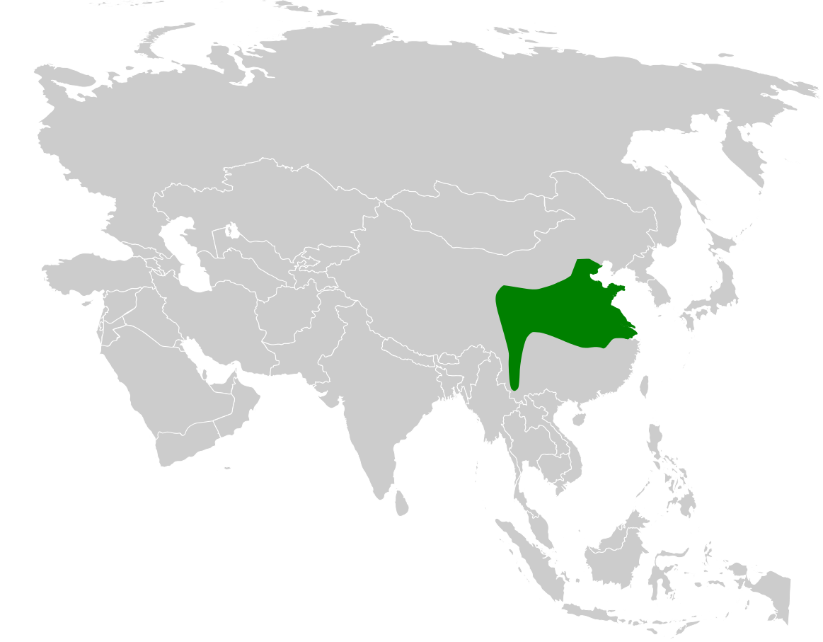 Aegithalos glaucogularis distribution map, based on